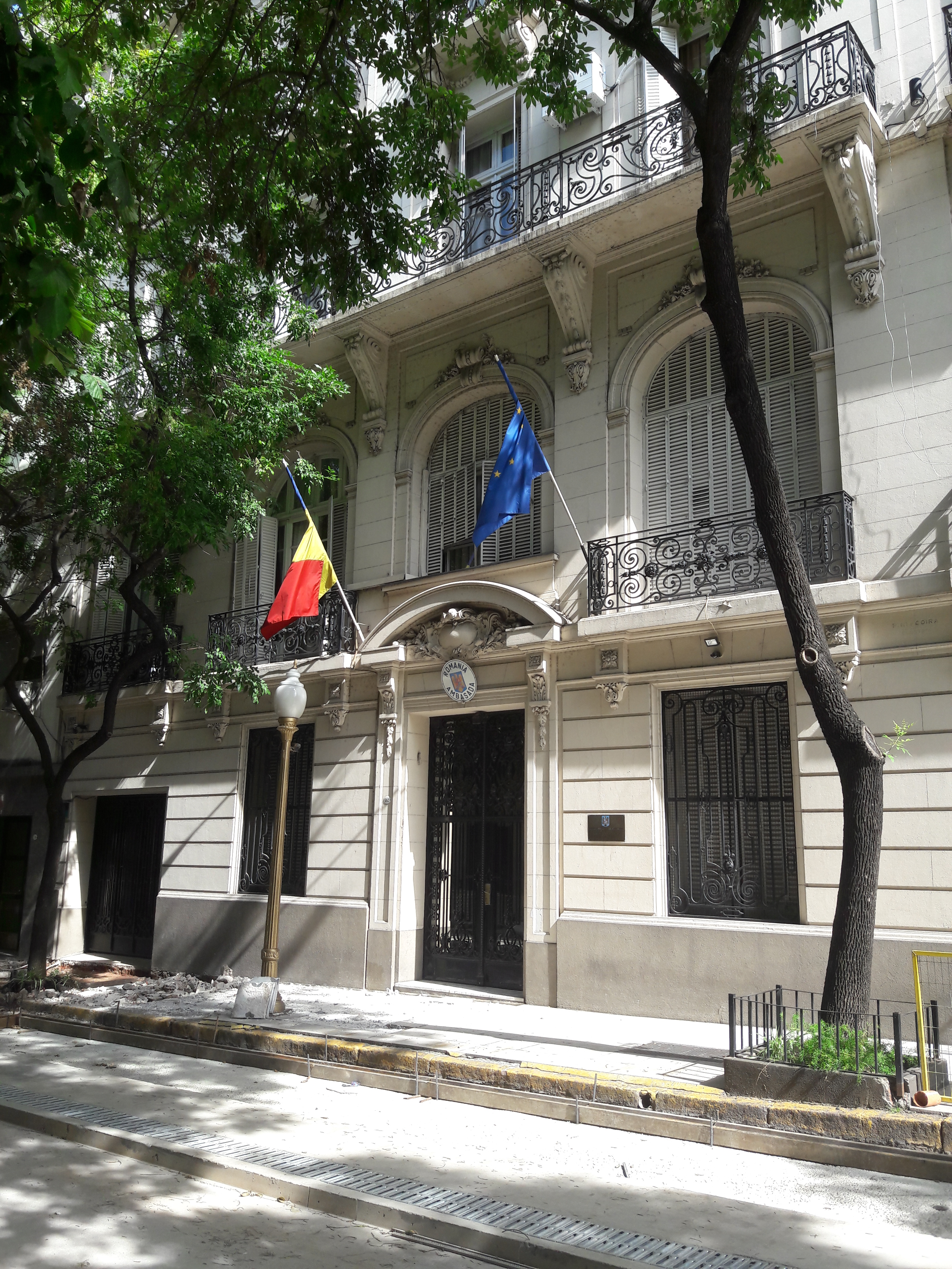 Embajada de Rumania, Retiro, Buenos Aires, Argentina.